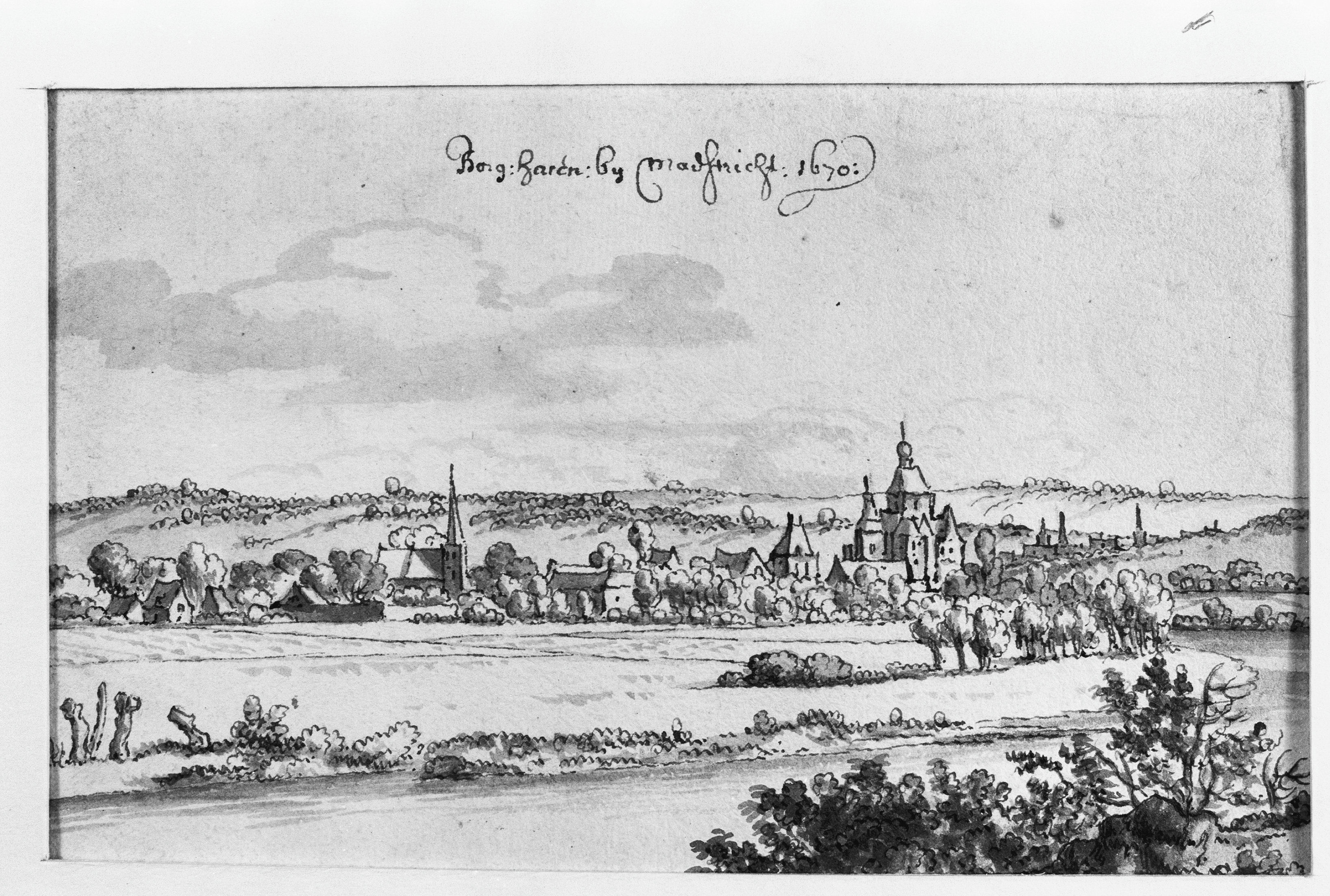 Plattegronden En Overzichten: Overzicht, tekening van J.de Grave, 1670